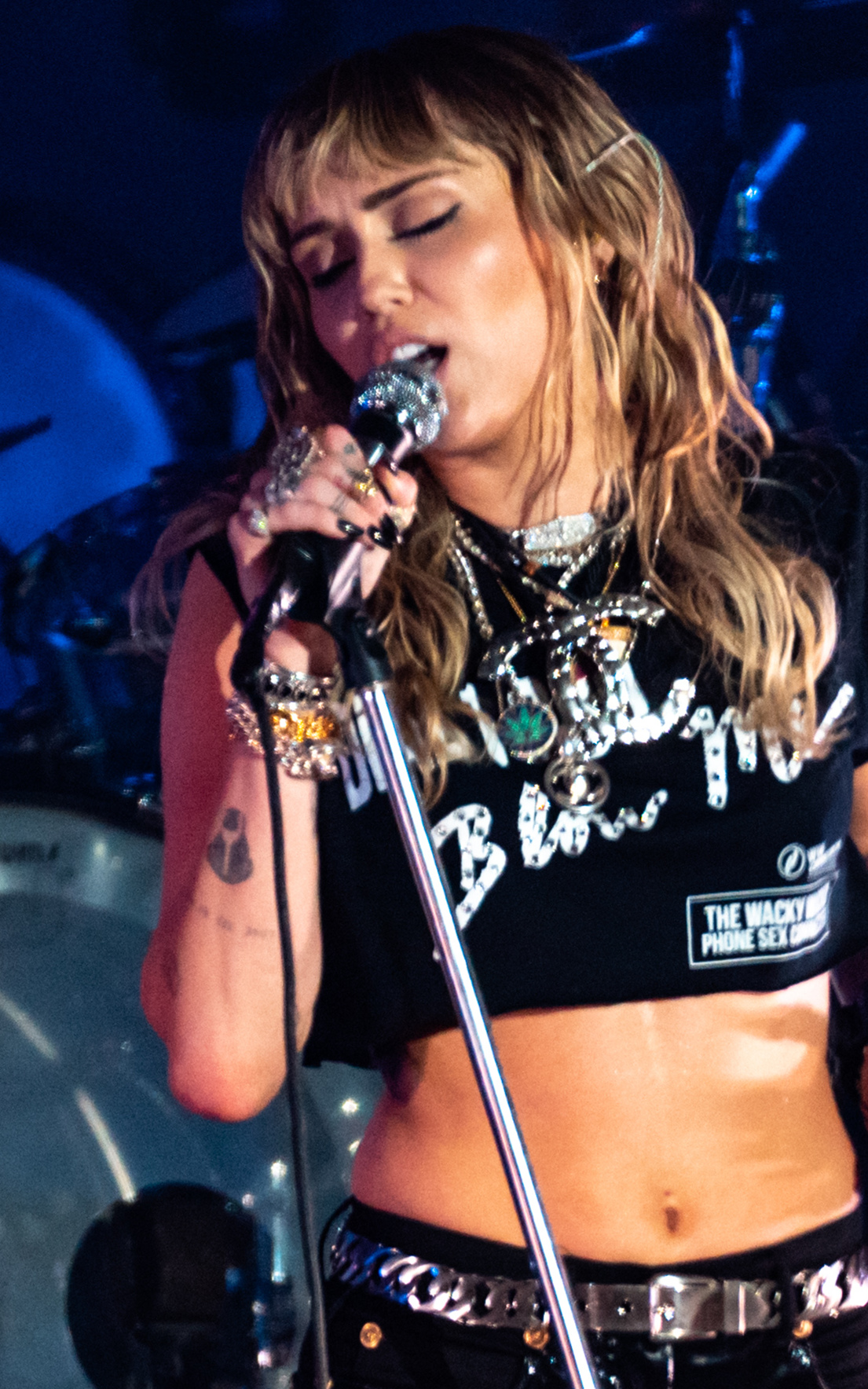 Primavera19_-231